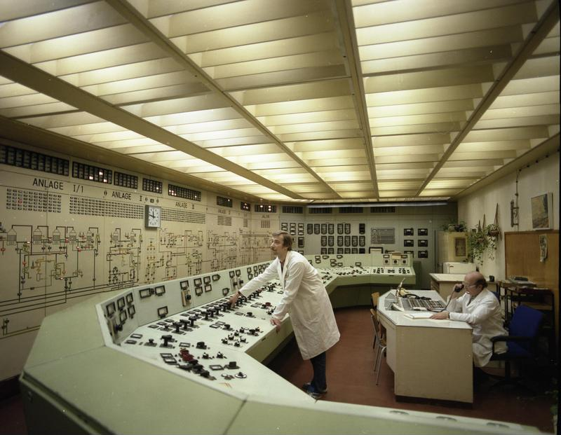 ADN-ZB/Junge/29.1.90/Bez. Potsdam: KKW Rheinsberg/ Die Warte der speziellen Wasseraufbereitung des Betriebsteiles KKW Rheinsberg vom VE Kombinat Kernkraftwerke "Bruno Leuschner" Greifswald.